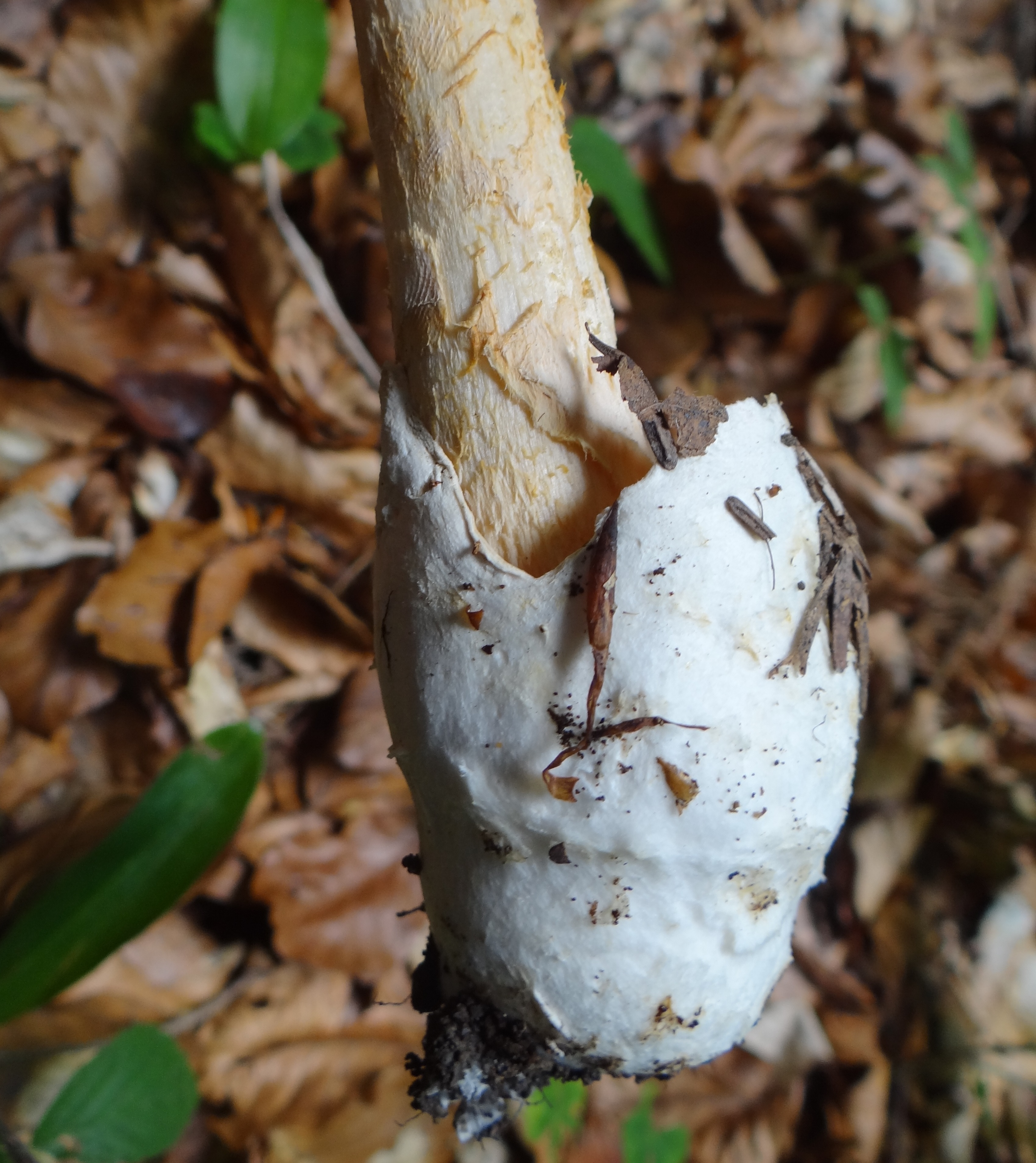 Amanita vaginata (location: Poland)